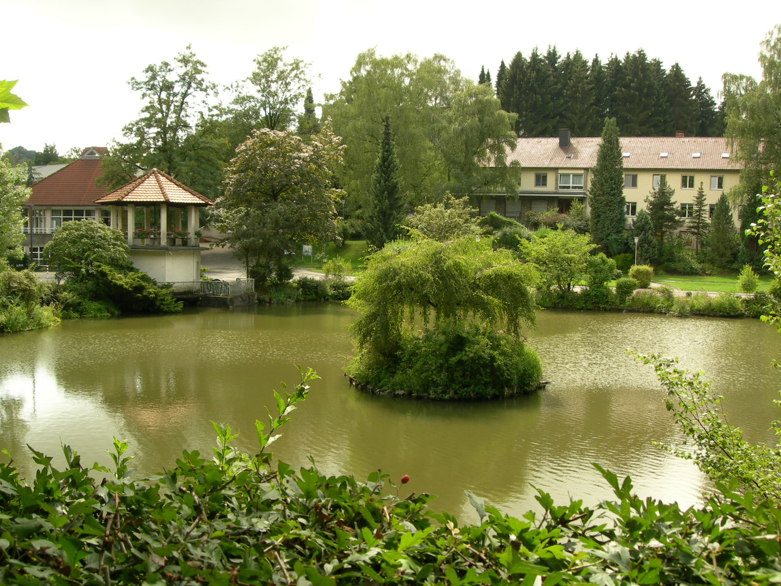 Diakonie Bleibergquelle, Velbert, Germany